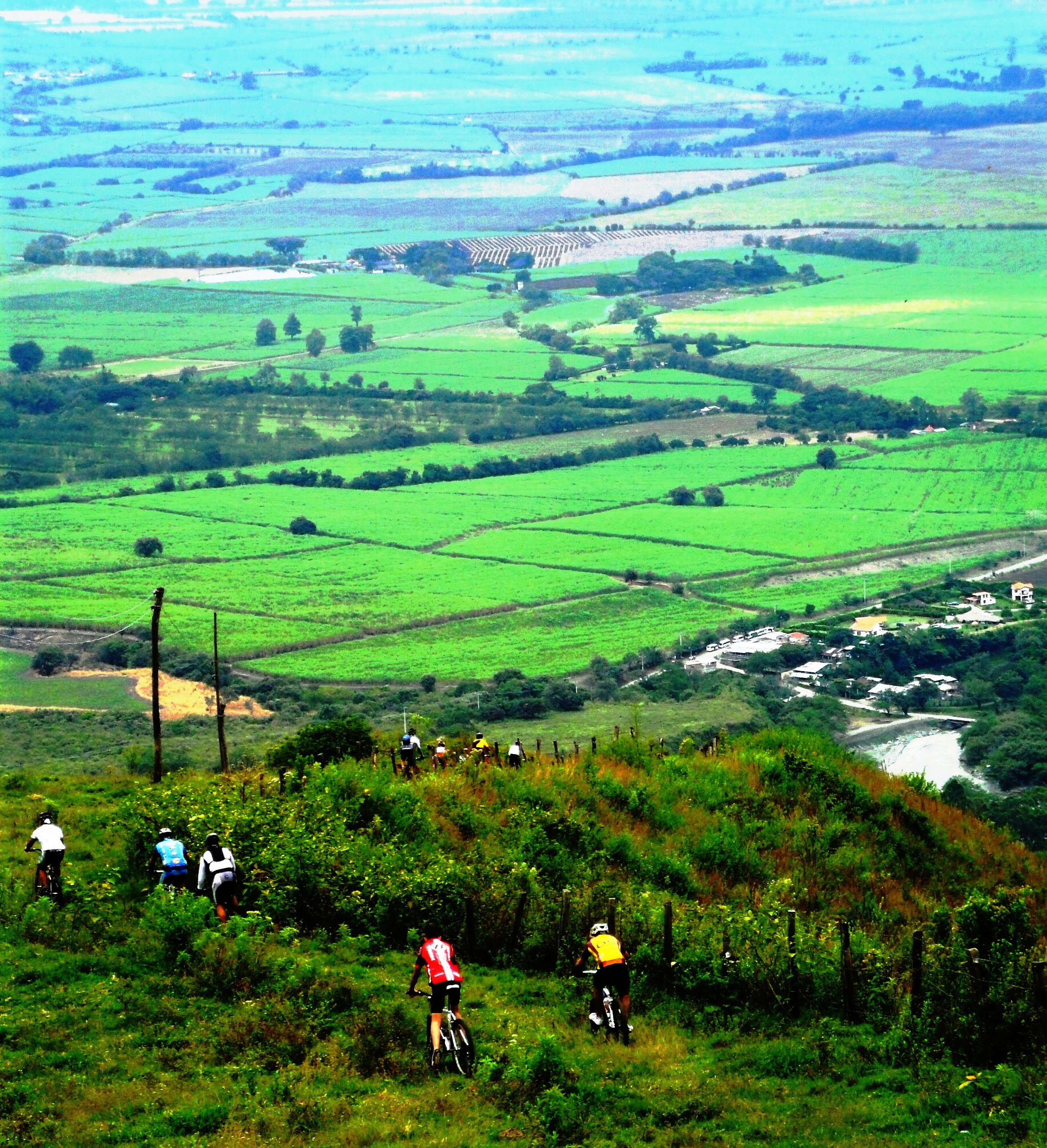 ciclomontañismo en el valle del cauca CORDILLERA CENTRAL